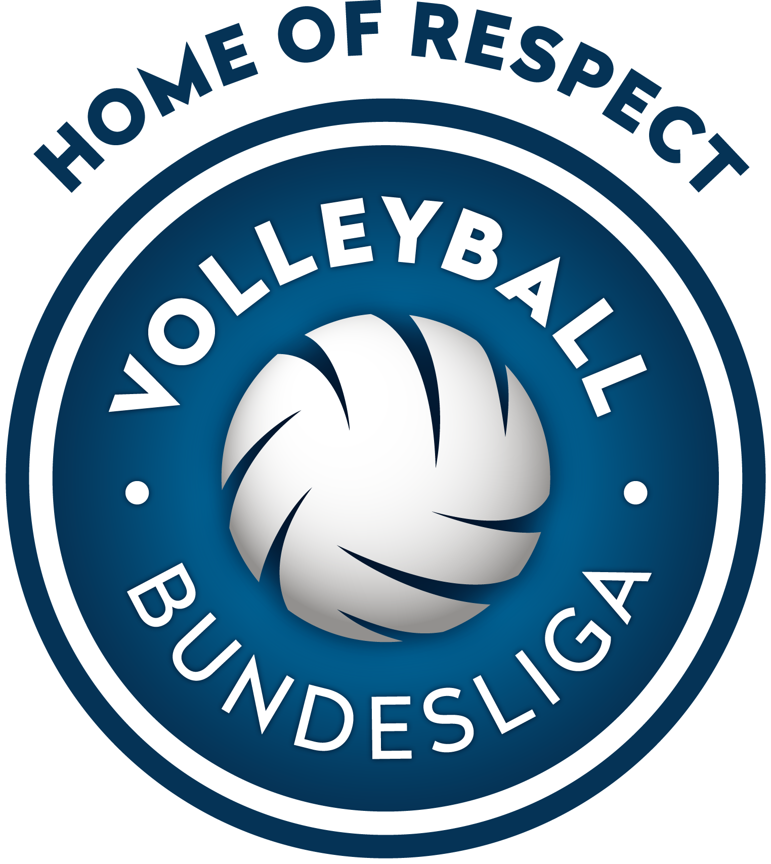 Logo der Volleyball Bundesliga, neues Logo nach Namensänderung im August 2014